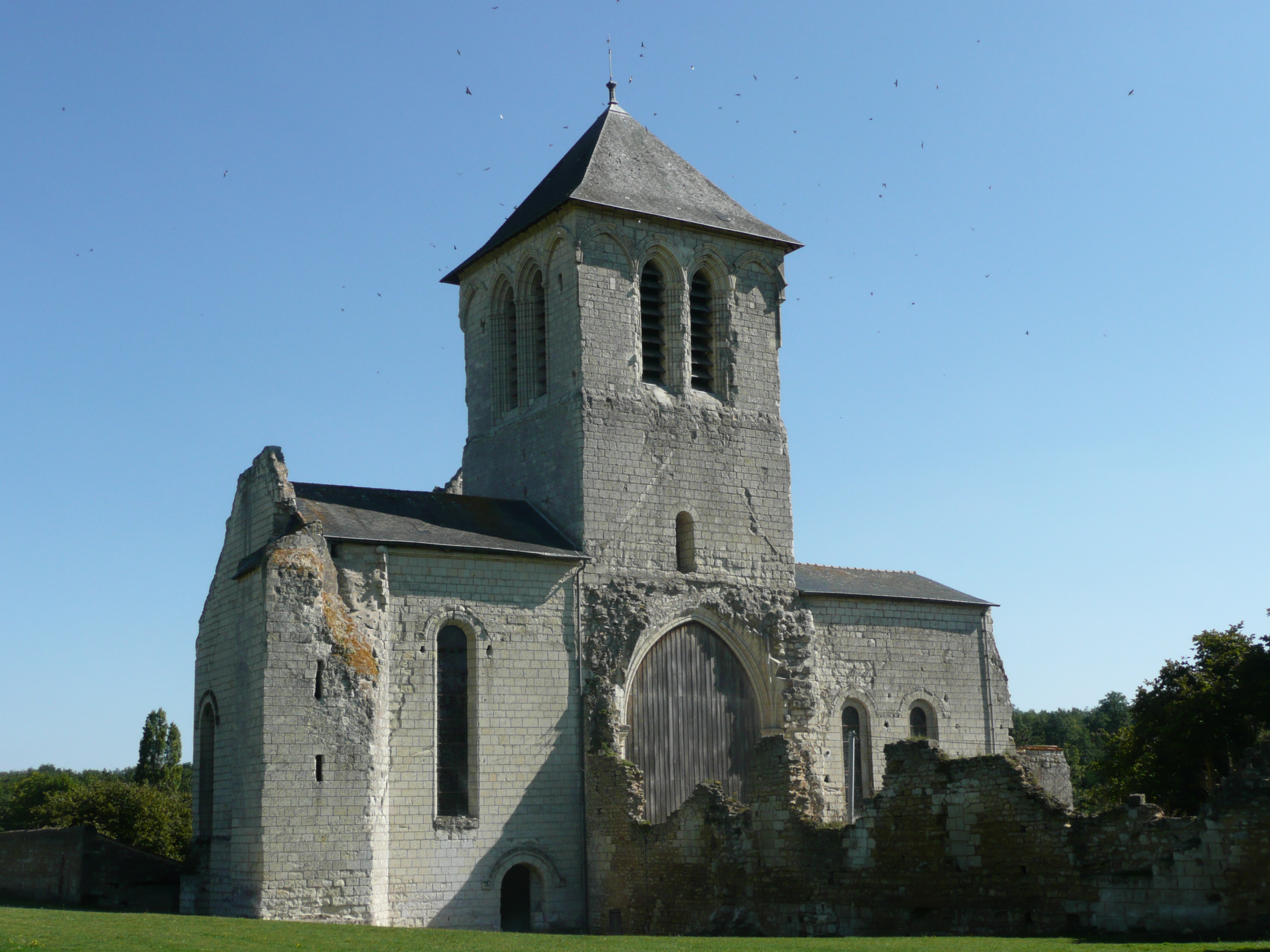 Cisay - Prieuré .